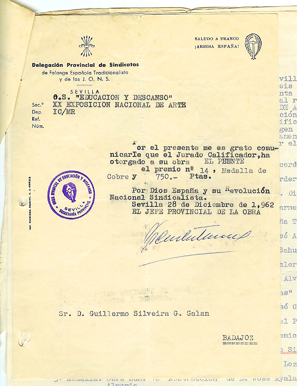 Documento informativo de la concesión de la Medalla de Cobre y 750 pesetas de la XX Exposición Nacional de Arte de la Obra Sindical de Educación y Descanso por El puente (n.º 34).